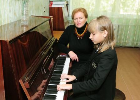 Дитяча музична школа